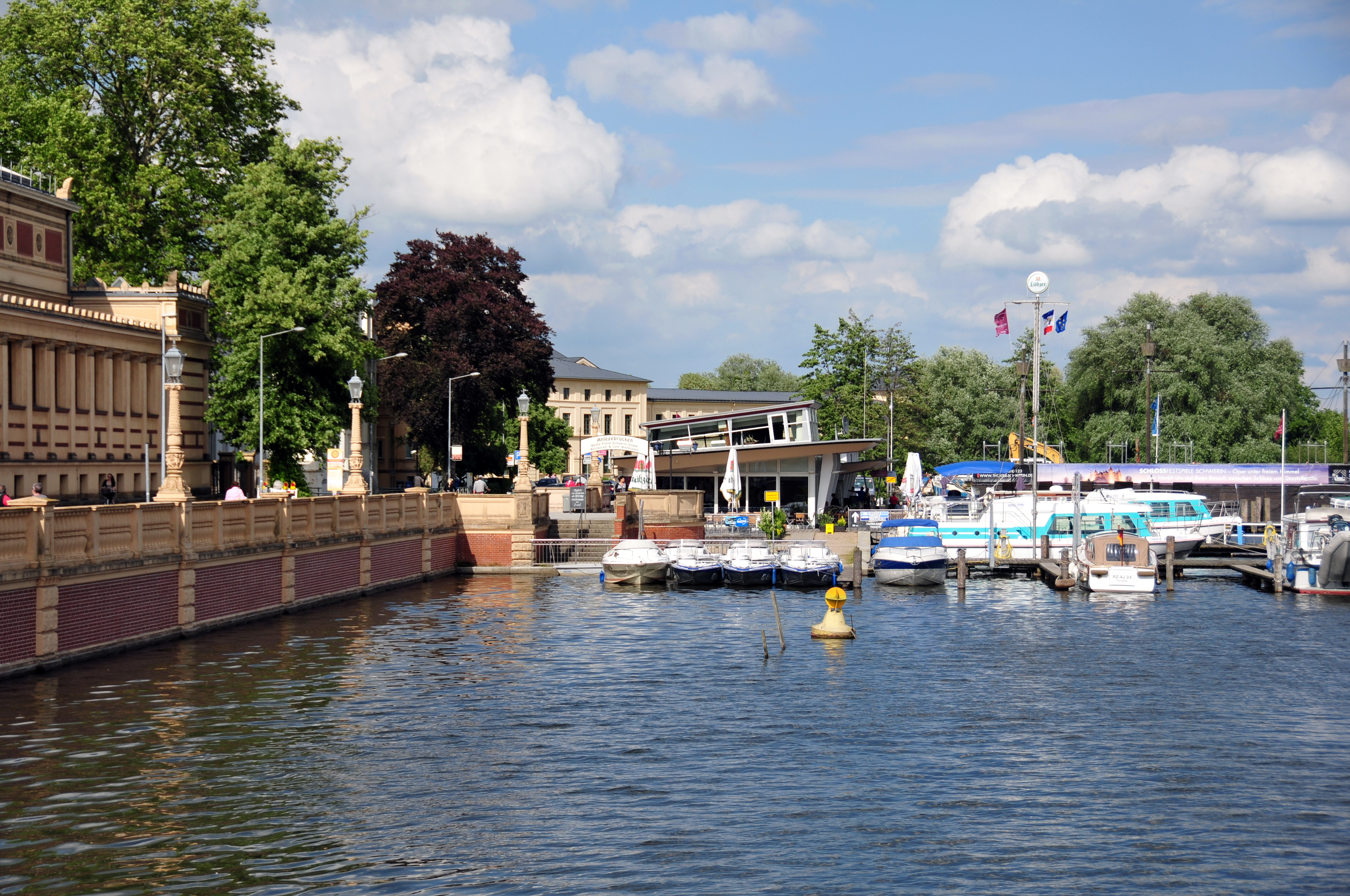 Schwerin; mit 50mm Brennweite von der Orangerie zum Bahnhof Anlegestelle der Weißen Flotte